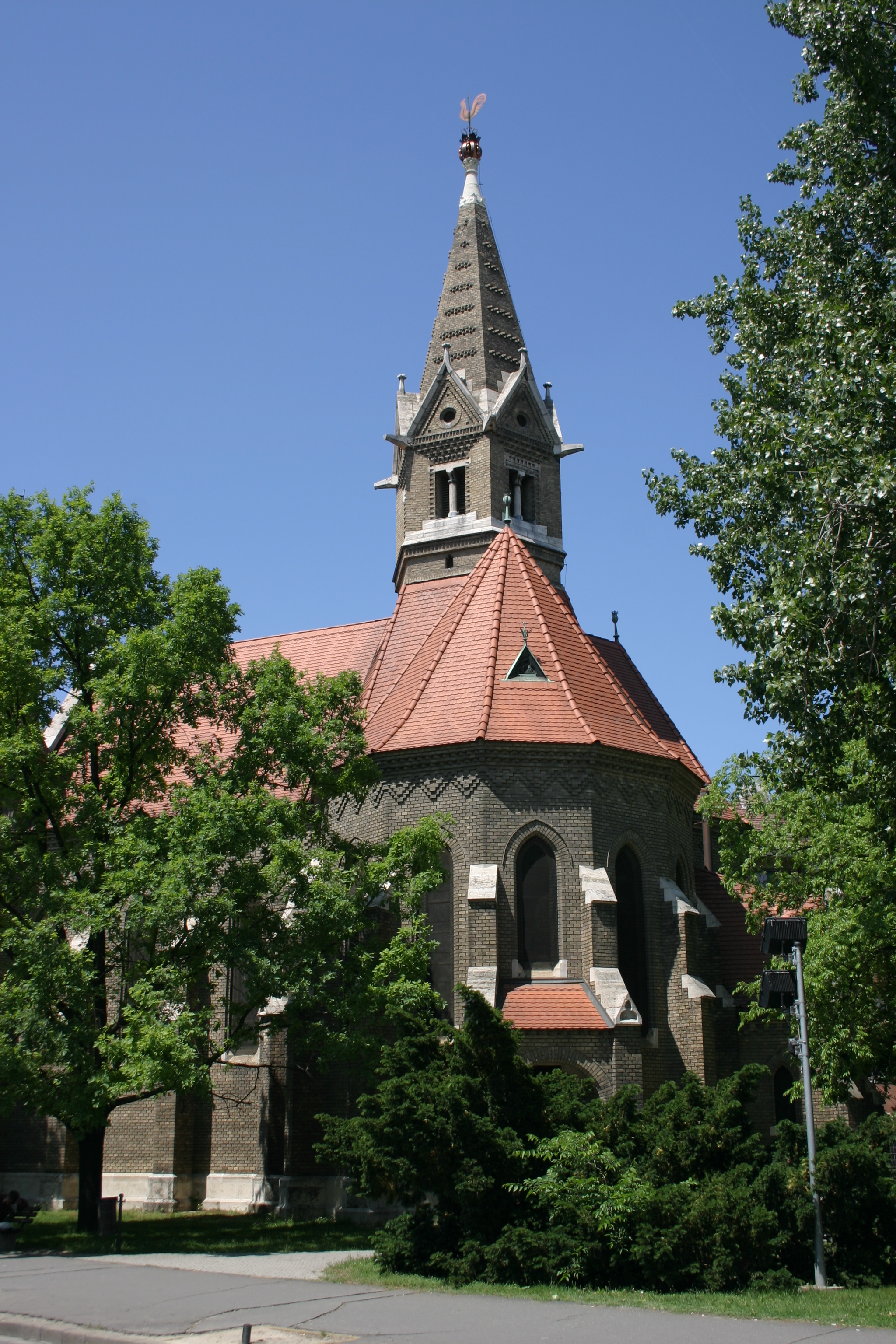 Szeged, Kálvin tér: "Kakasos" református templom (Schulek Frigyes tervei alapján épült 1884-ben This is a photo of a monument in Hungary. Identifier: 9096